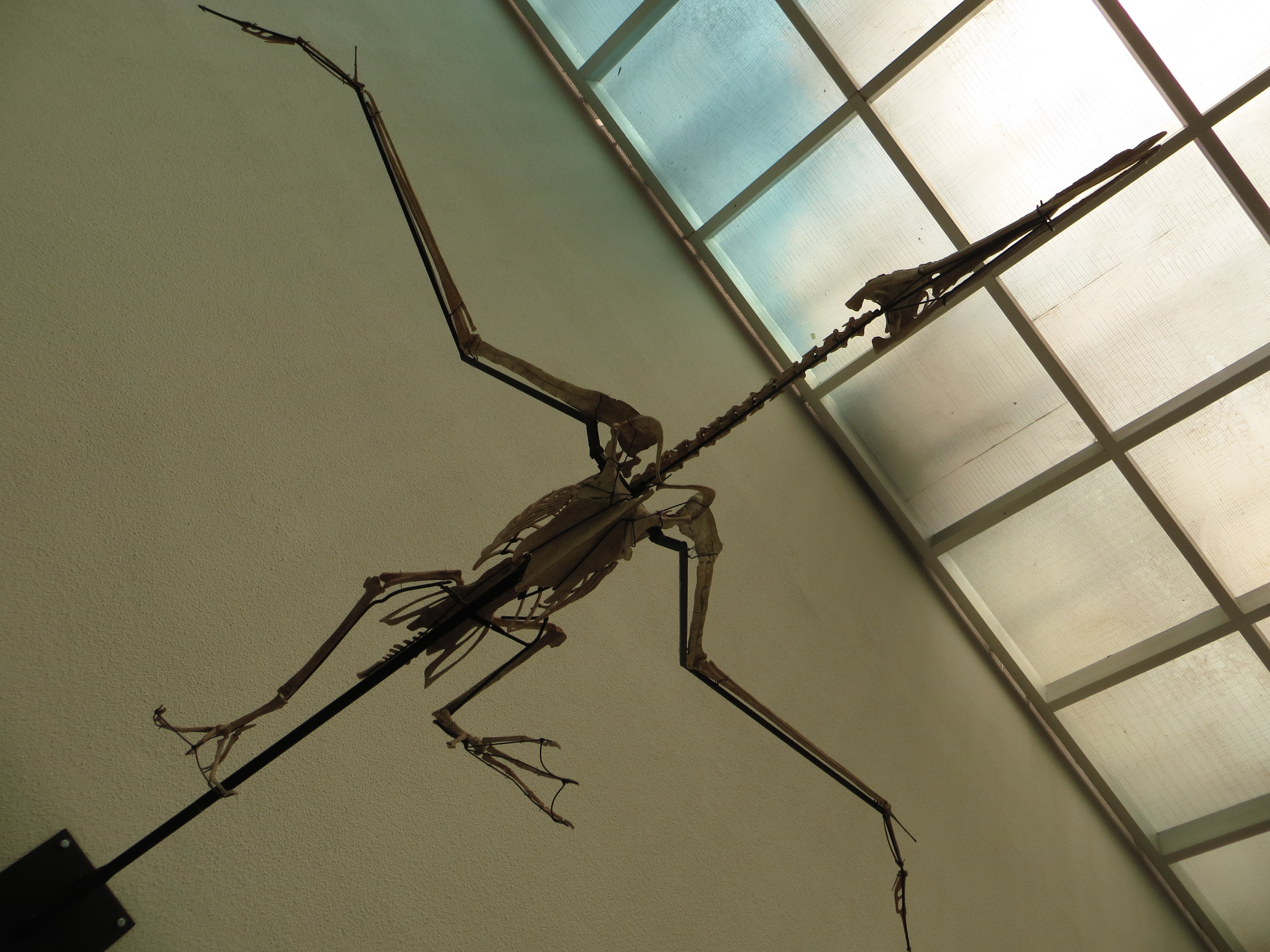 Fossil - Took the picture at Museum of Natural History Karlsruhe